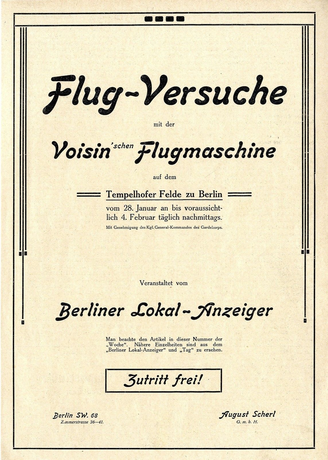 Flug-Versuche mit der Voisin'schen Flugmaschine auf dem Tempelhofer Feld, 1909